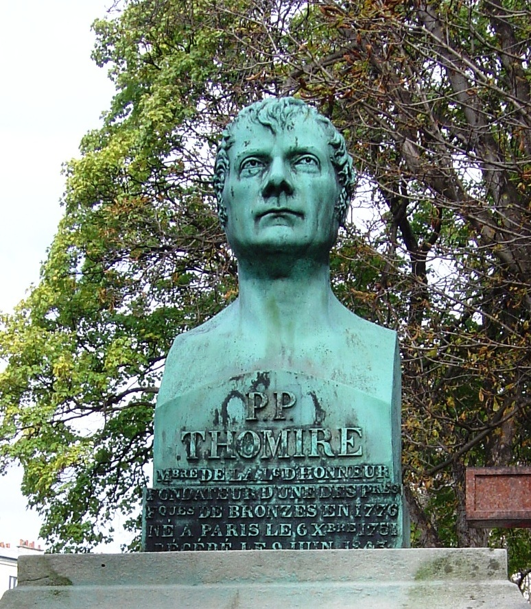 Cimetière de Montmartre : Monument à P.P. Thomire (fonderie de Eck et Durand).